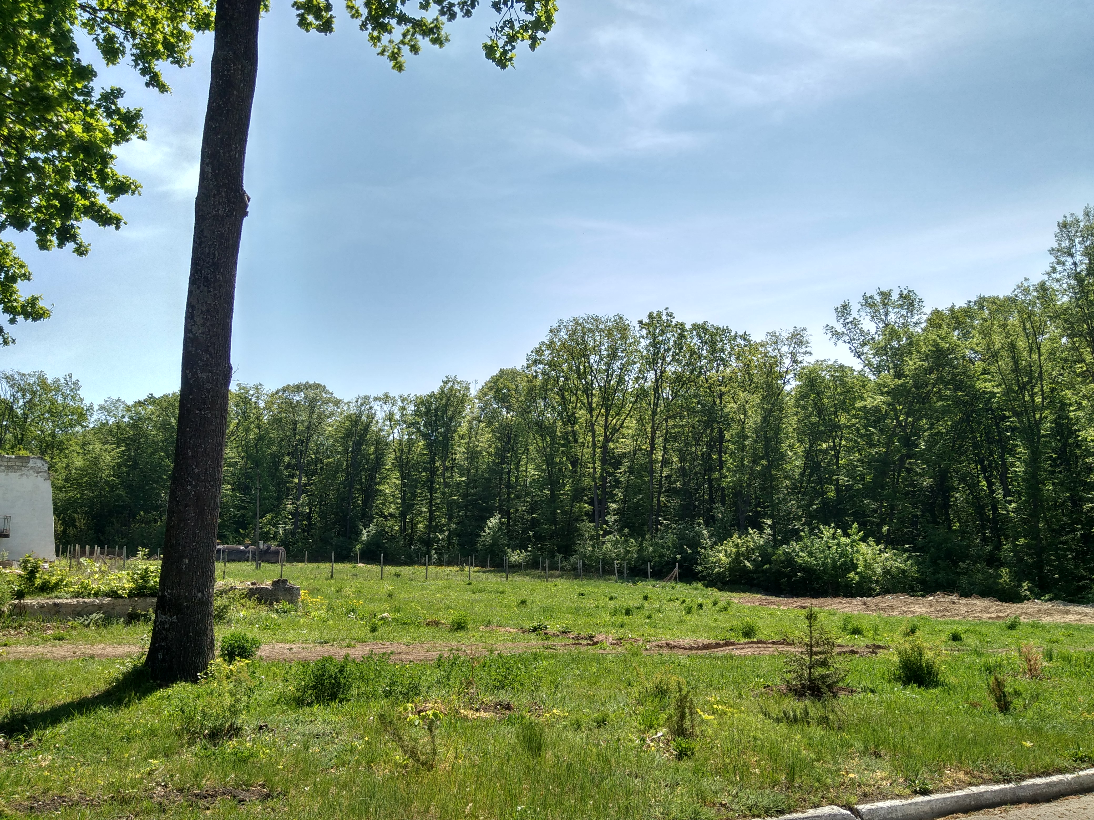 Zăbriceni, monument al naturii amplasat în raionul Edineț, la nord-vest de satul Onești, ocolul silvic Edineț, Zăbriceni, parcelele 45-49 (cod MD-ED-rp-021)